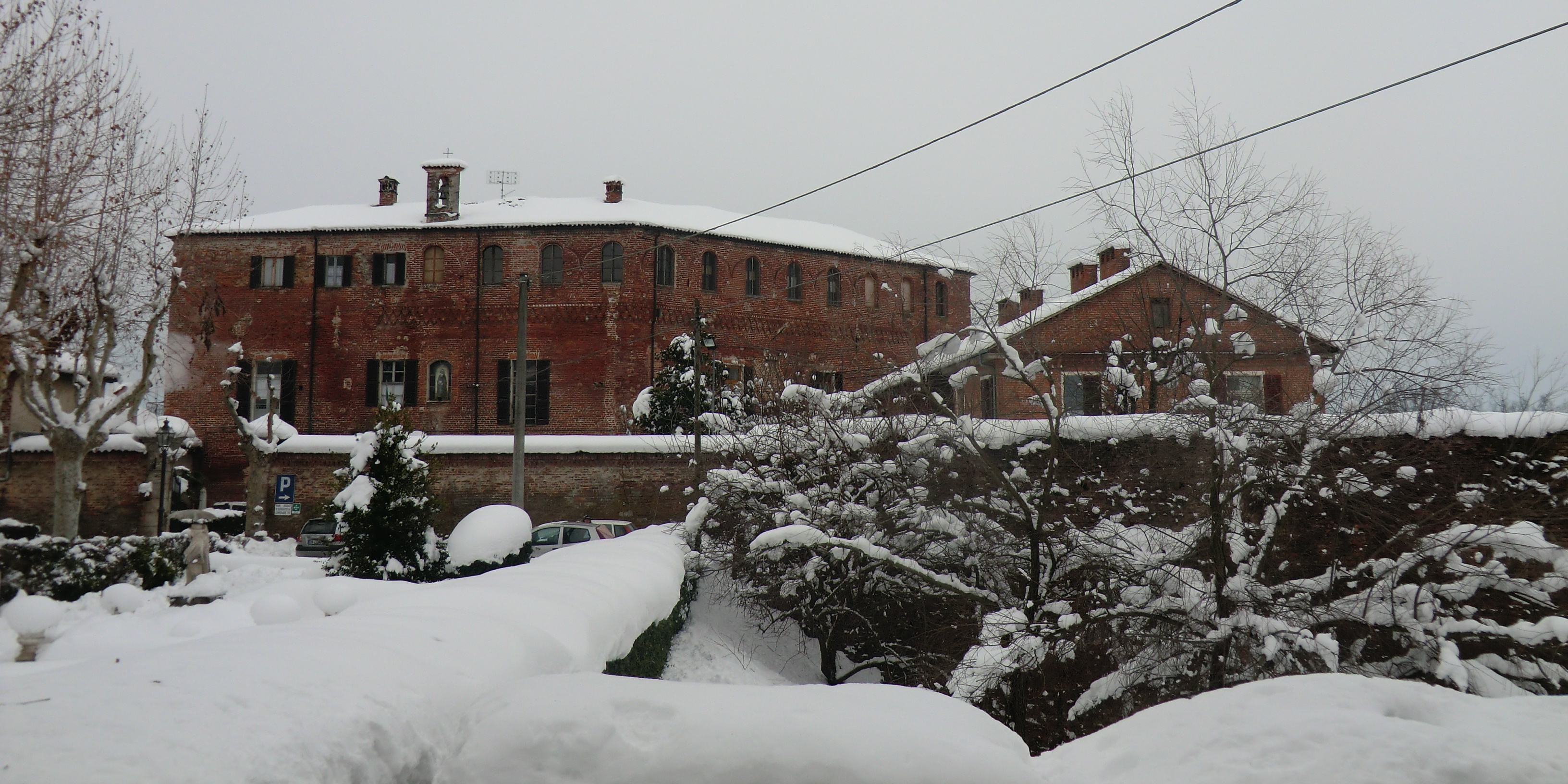 Bene Vagienna (Cuneo): castello dei Conti Costa